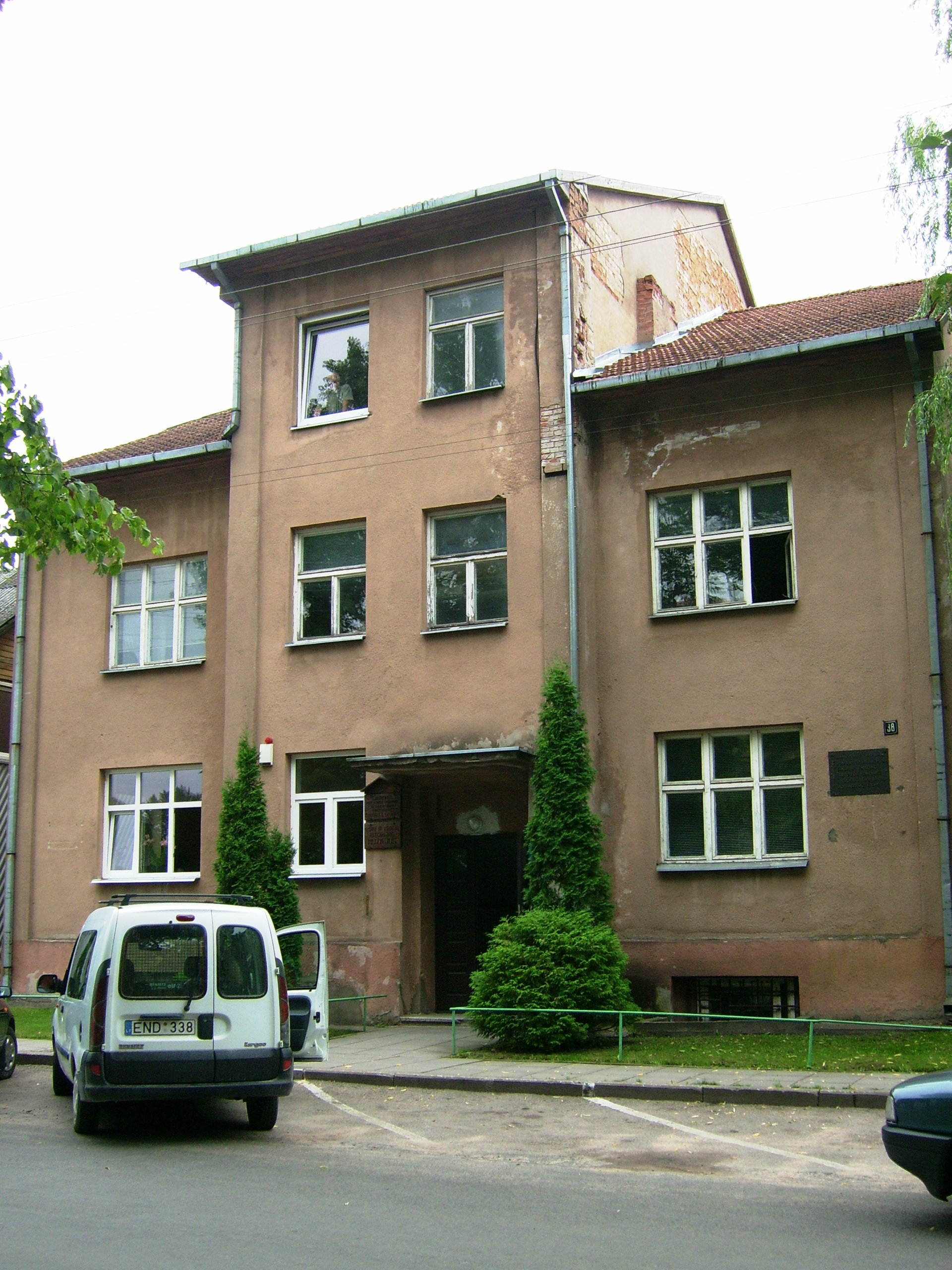 Buvusi Tauragės NKVD (MGB) būstinė, dabar muziejus, atminimo memorialas